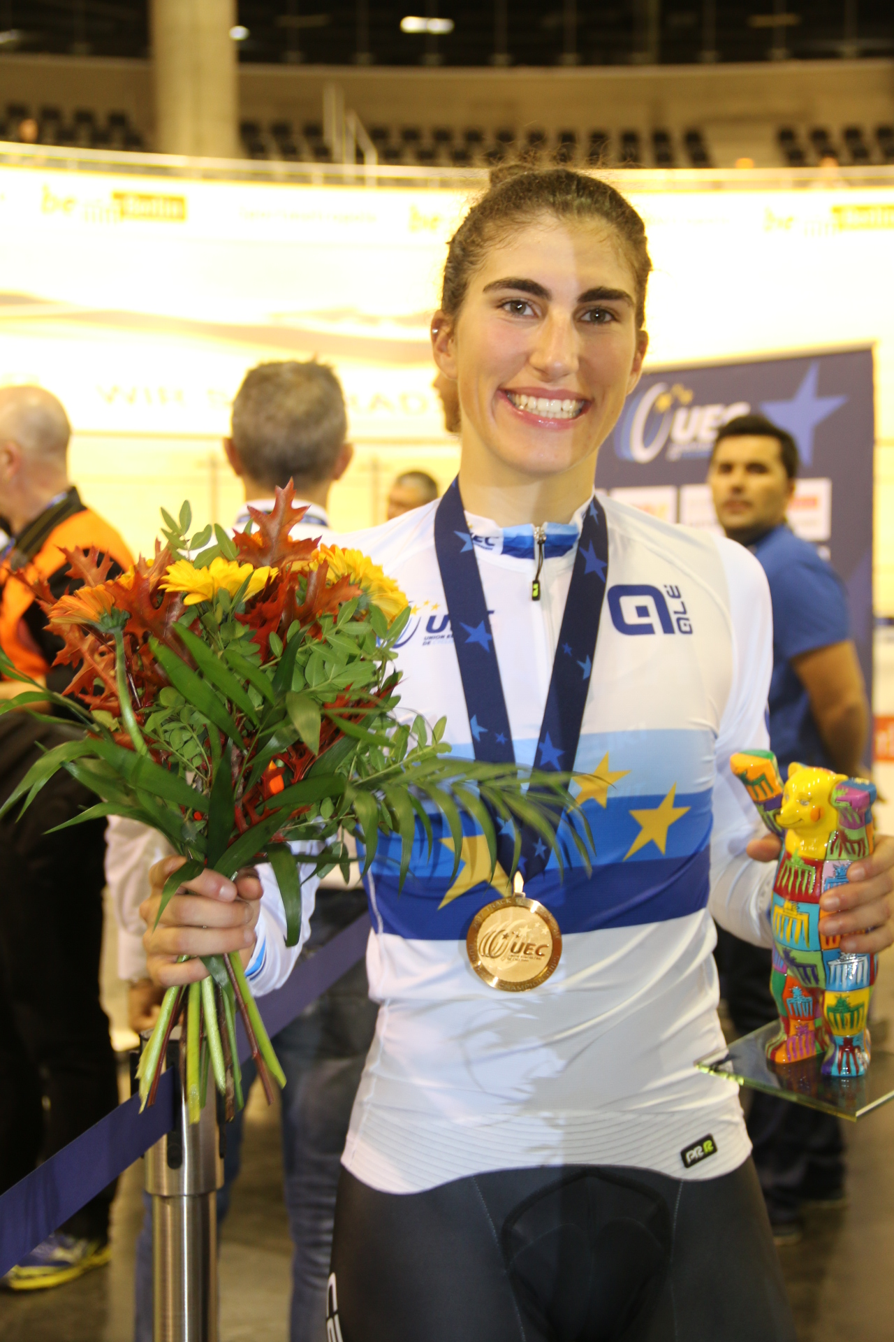 Elisa Balsamo, ital. Radsportlerin - Gold in der Mannschaftsverfolgung